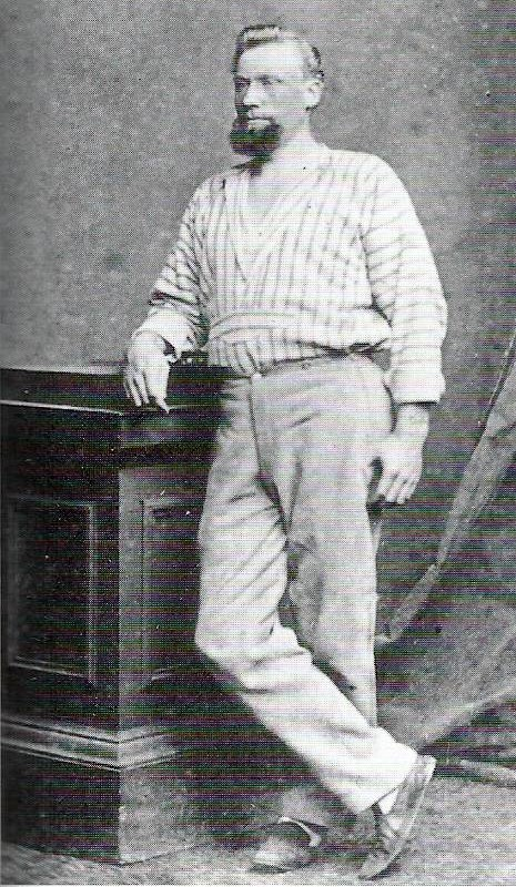 Der Unternehmer Henry Koch um 1850.